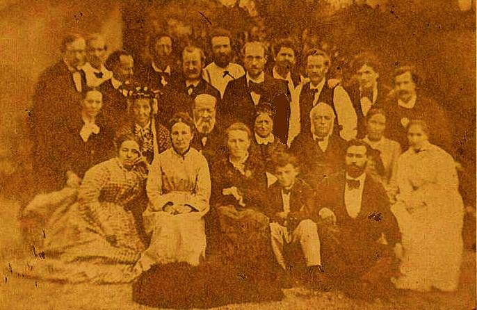 Groupe de goguettiers avec leurs épouses à la partie de campagne du 20 août 1876 à Pomponne-les-Bois.